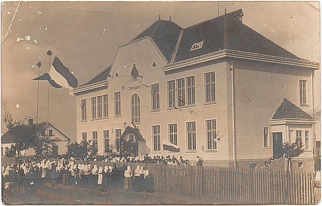 Polská škola